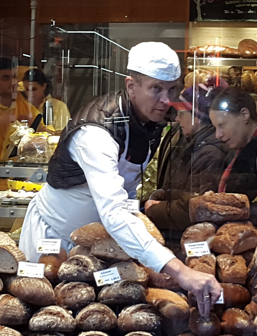 Josef Hinkel (* 1959), Geschäftsführer der Bäckerei Hinkel, Düsseldorf